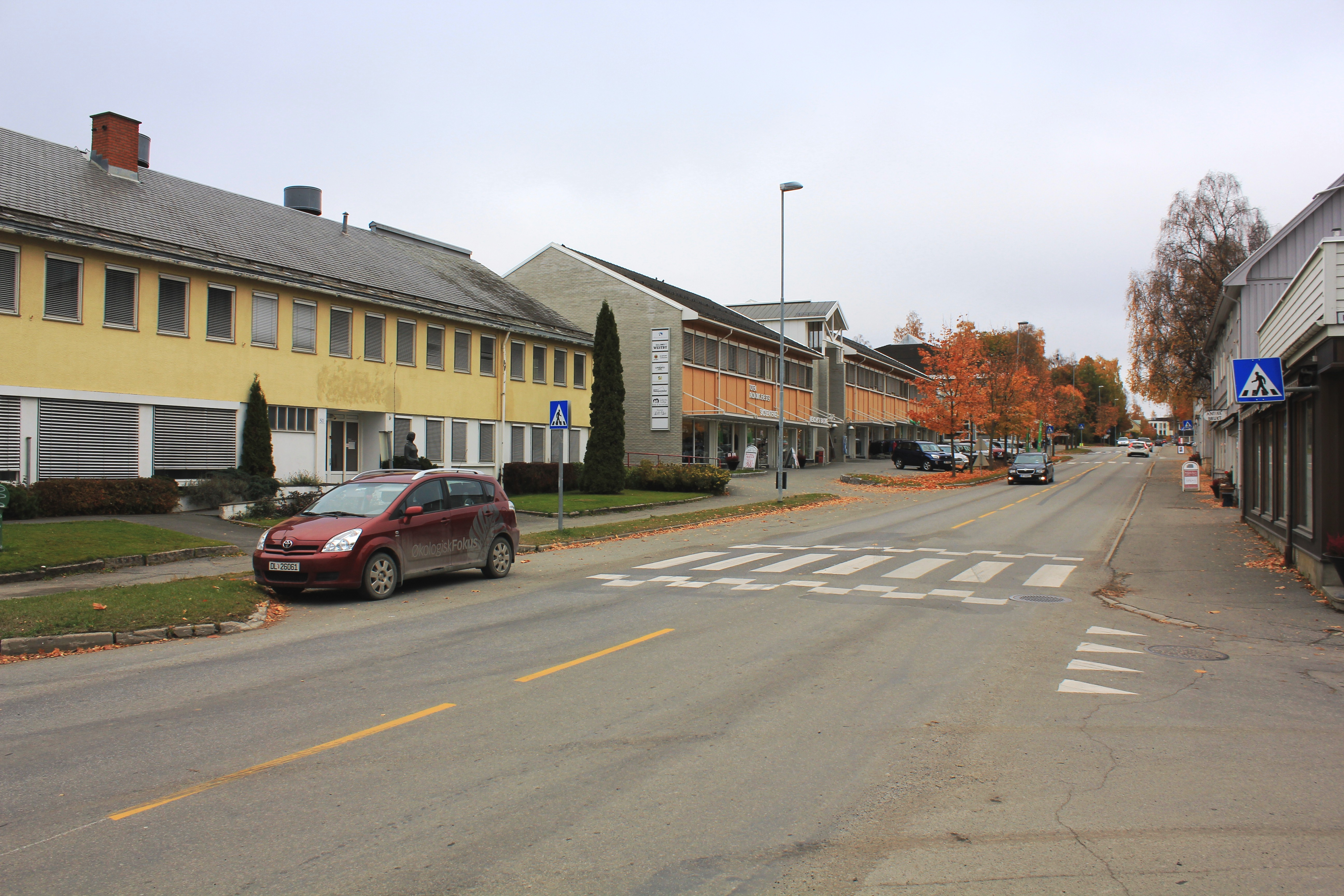 Lena sentrum.